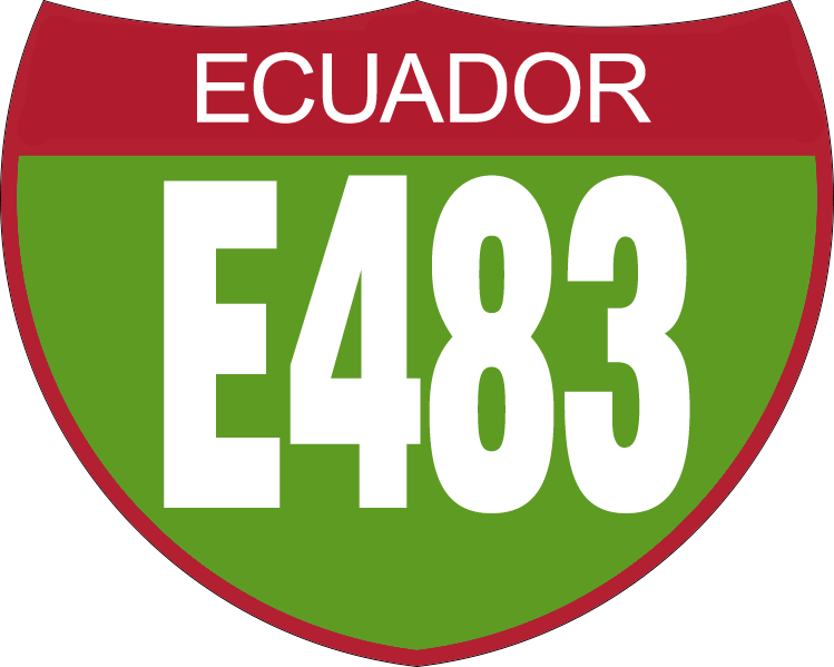 Disco de Identificación Vía Colectora E483